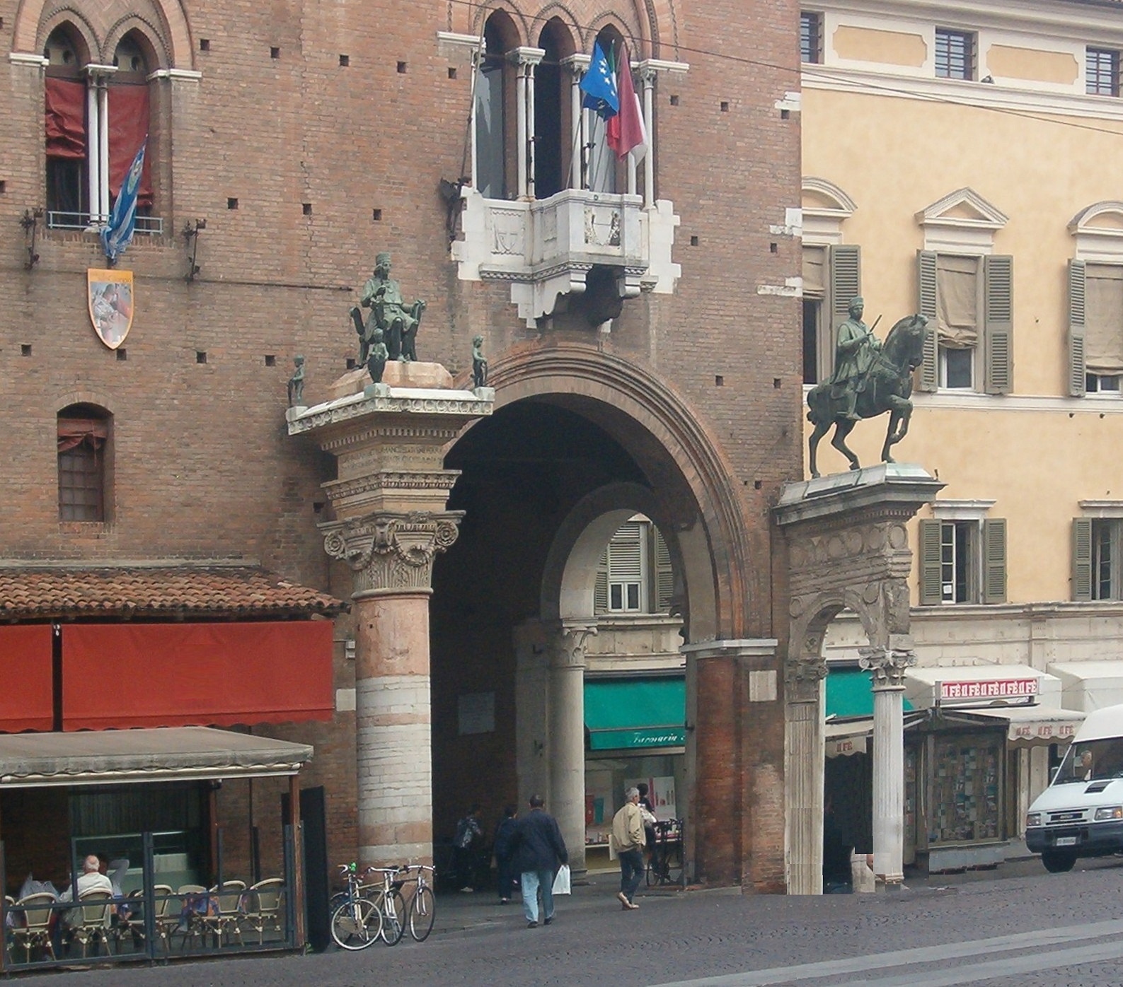 Volto del Cavallo, Palazzo Ducale Estense, Ferrara